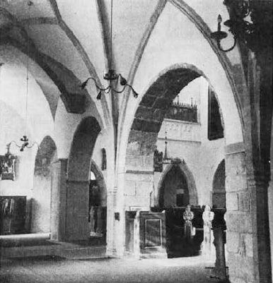 Pogled iz južne ladje skozi arkado v stransko ladjo (1943)